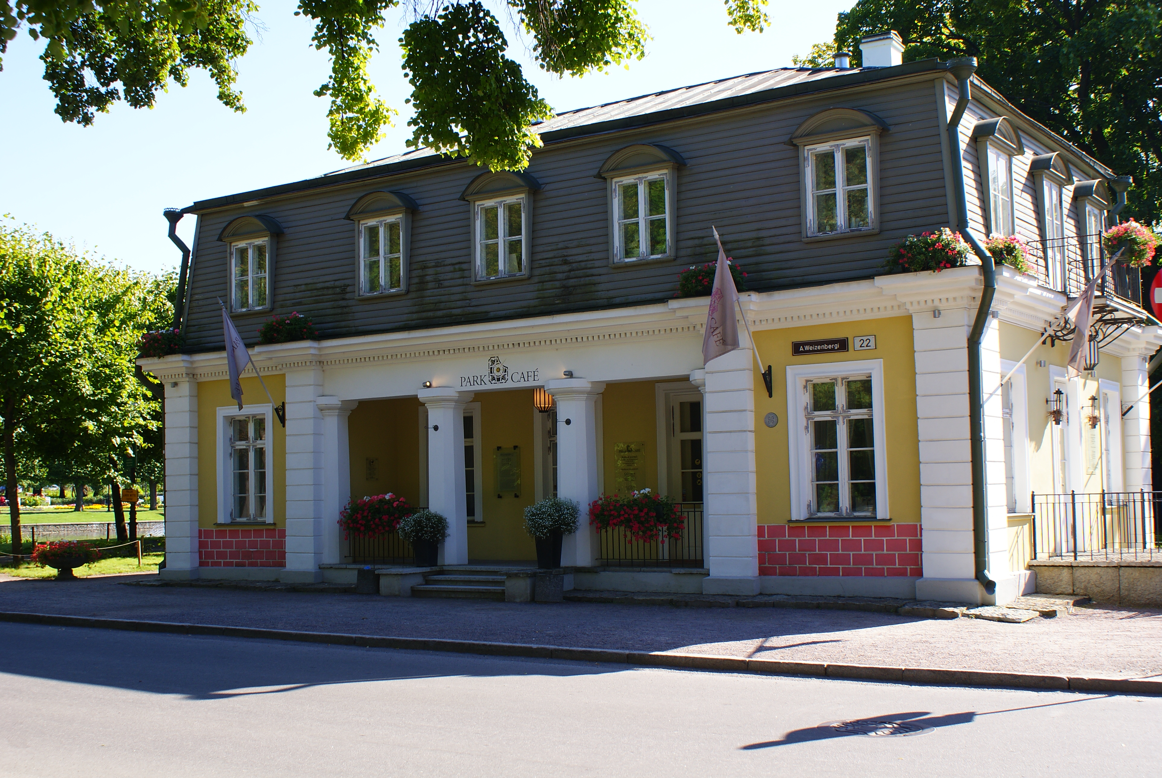 Kadrioru lossi külalistemaja